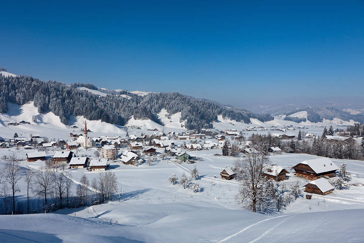 Das Dorf Marbach im Entlebuch